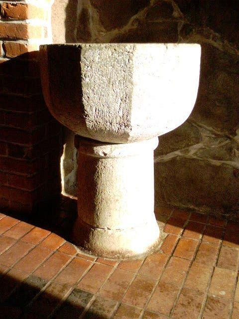 Gościno (pow. kołobrzeski), kościół pw. św. Anrzeja Boboli. Chrzcielnica z wapienia gotlandzkiego z przełomu XII i XIII wieku.